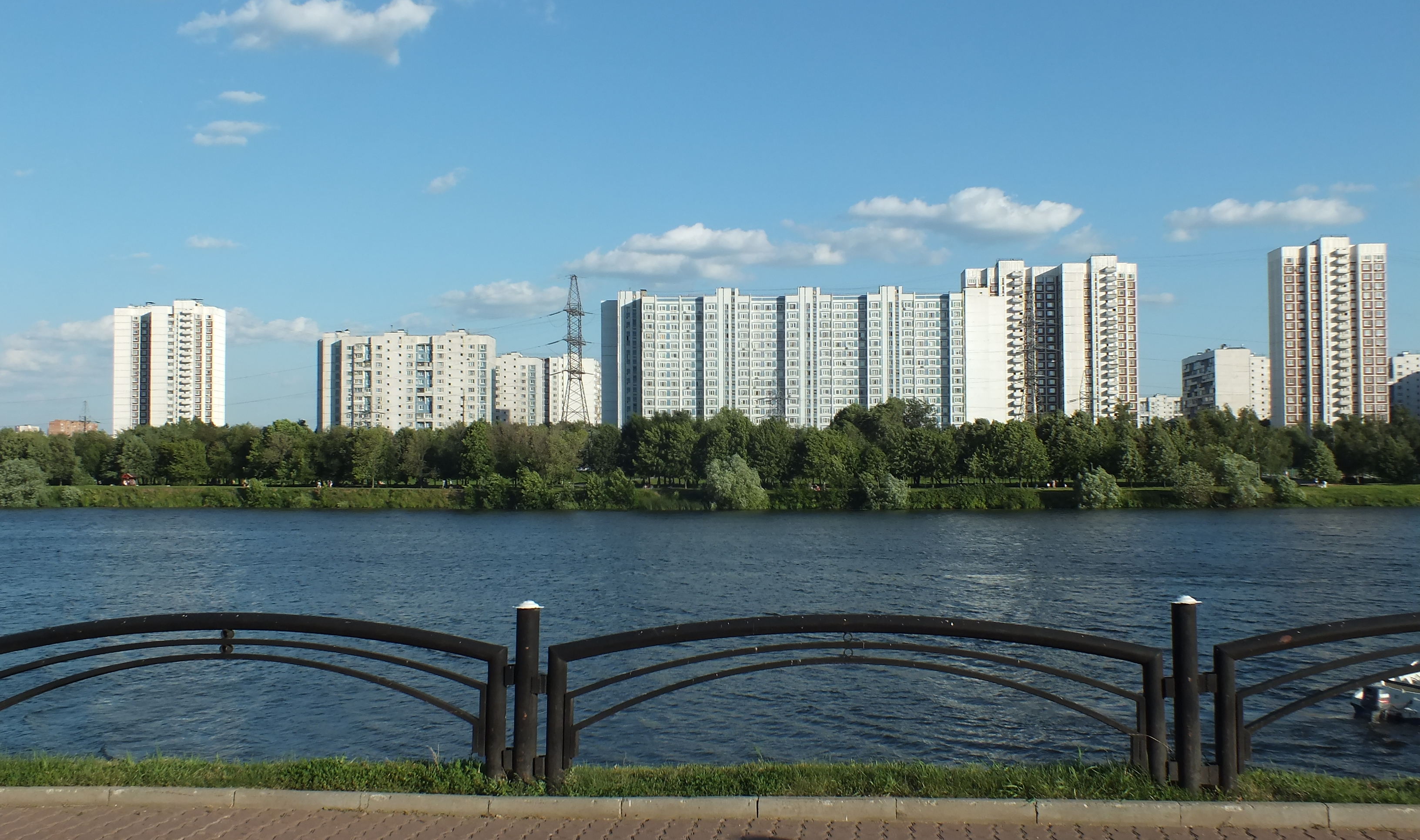 Дома в конце улицы Борисовские Пруды. Самый левый на фото дом — 48, к. 1; самый правый на фото — Алма-Атинская улица, дом 2. Бело-голубой дом в центре — 42, к. 1.